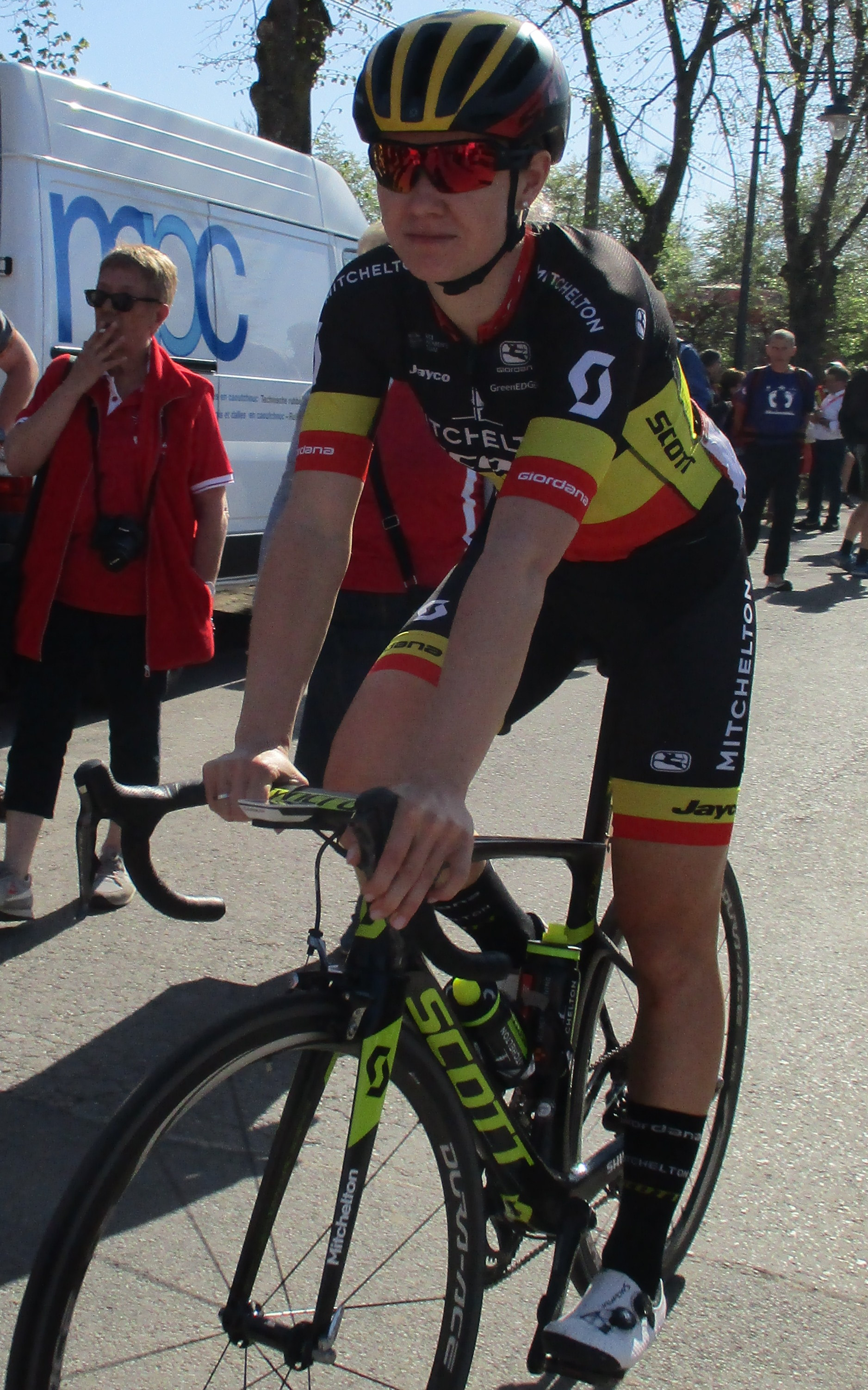 Start van de Waalse Pijl 2018 op de Mur van Huy.